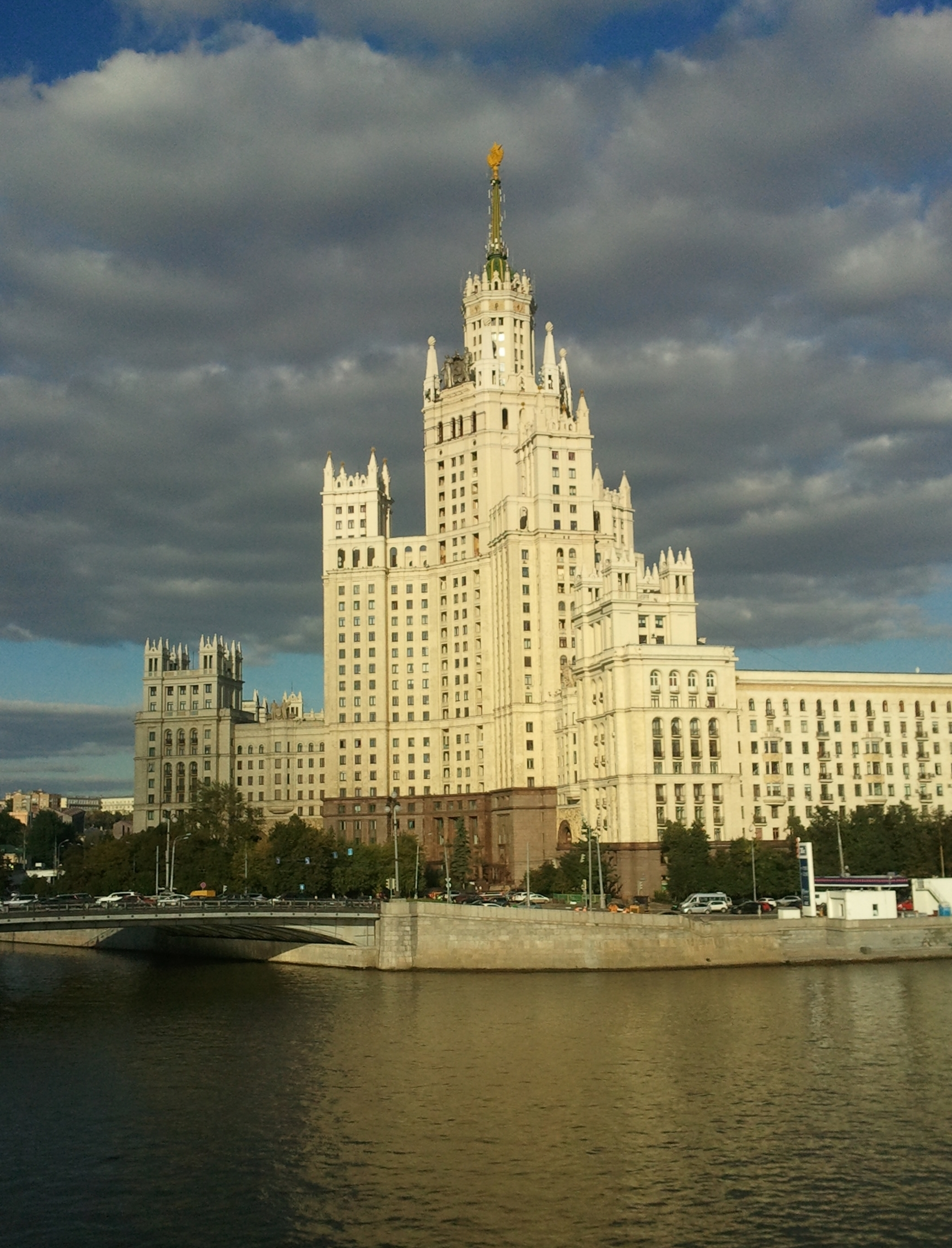 Высотка на Котельнической набережной. Москва, Россия